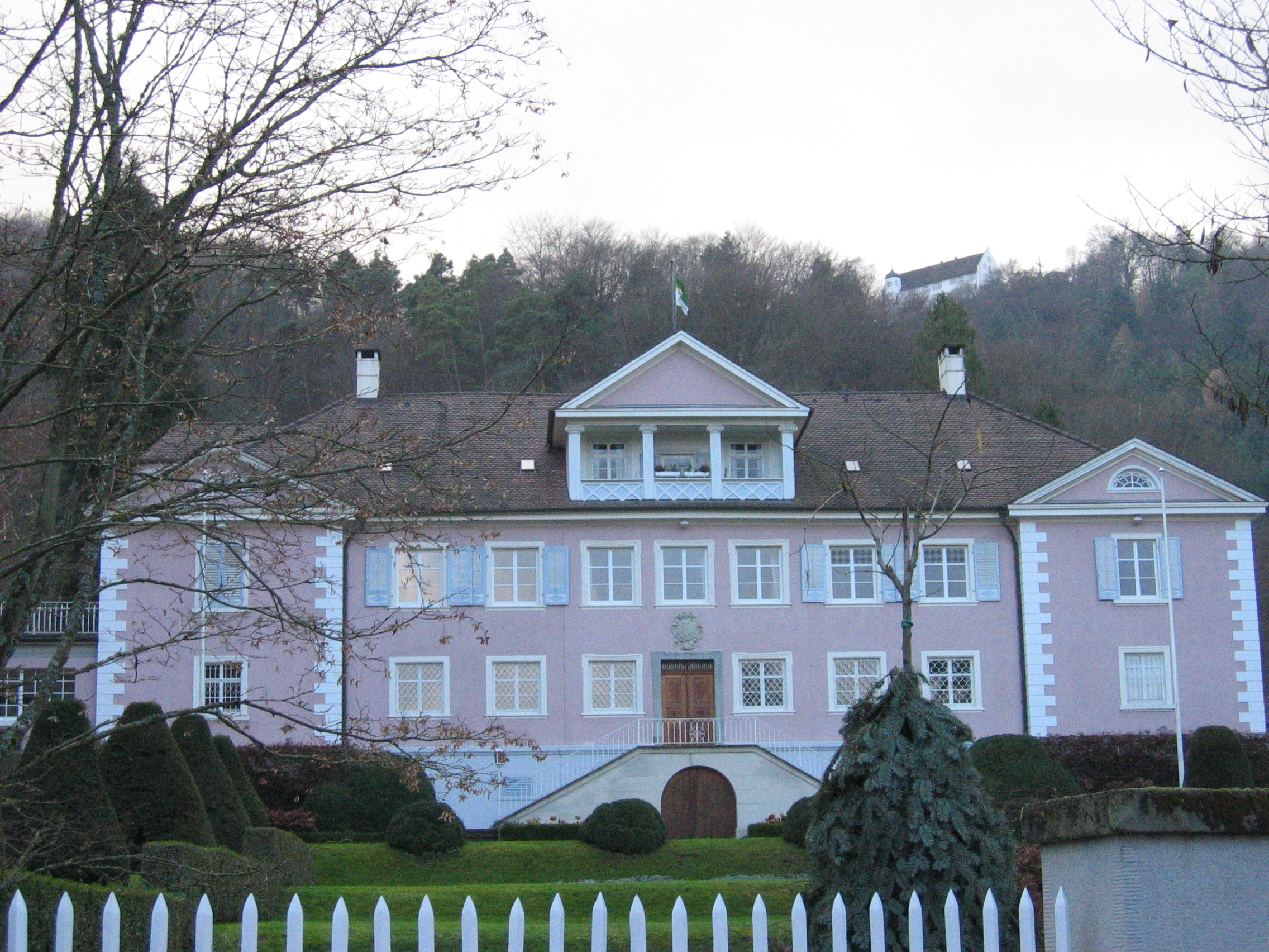 Beschreibung: Schloss Bodman in Bodman, Bodensee